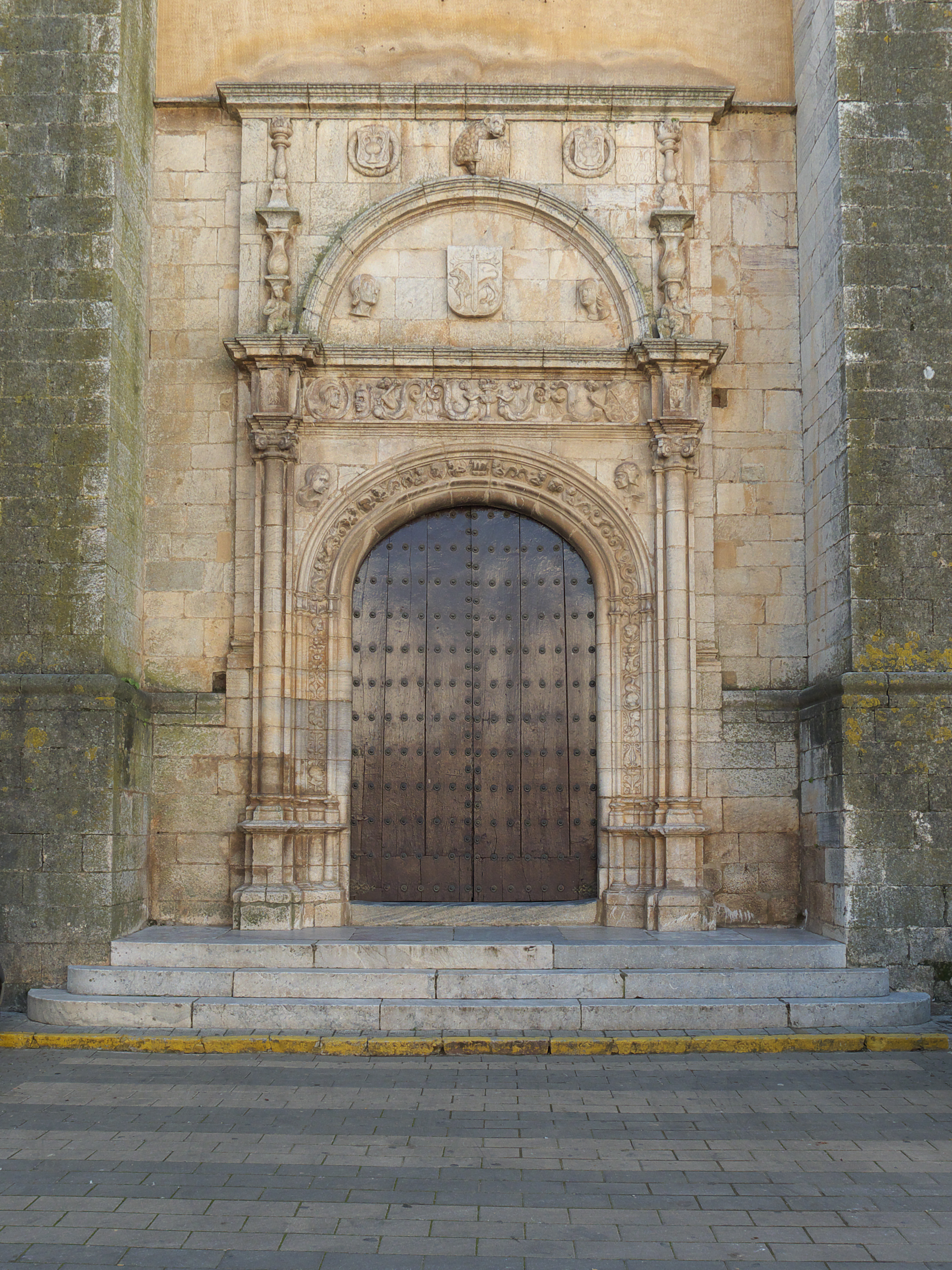 Portada de la nave del Evangelio.